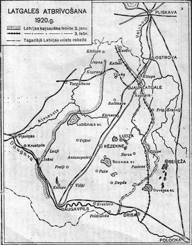 Frontes līnija Latgales atbrīvošanas kauju beigās un galīgā Latvijas—Krievijas robeža